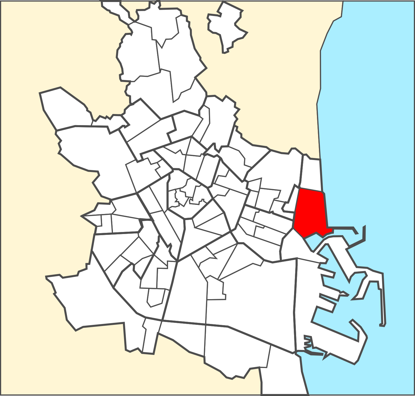 Localització del barri dins de la ciutat de València.